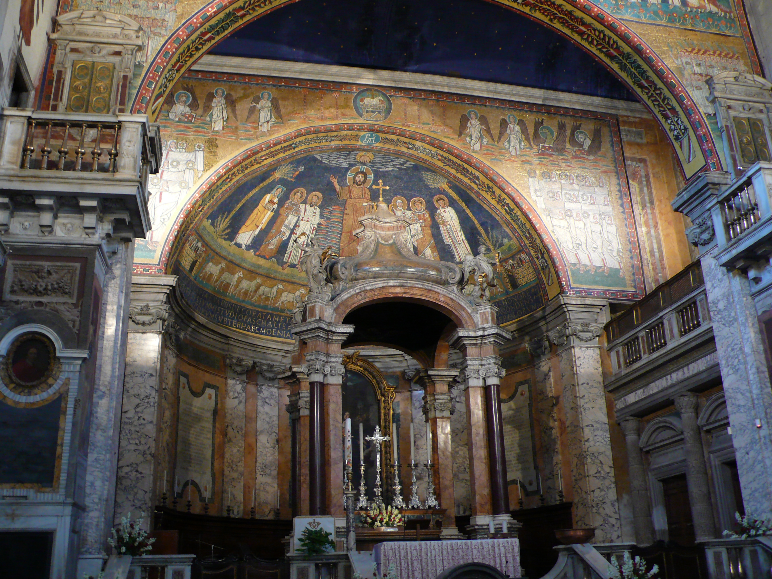 Santa Prassede, Rom; Triumphbogen und Apsis